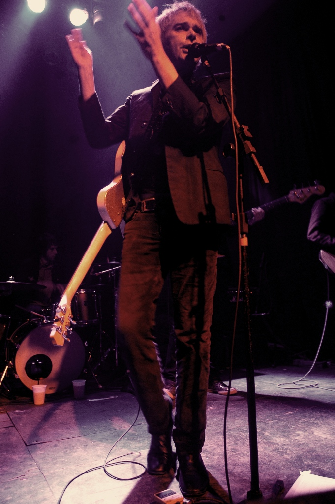 O músico brasileiro Júpiter Maçã (Flavio Basso).